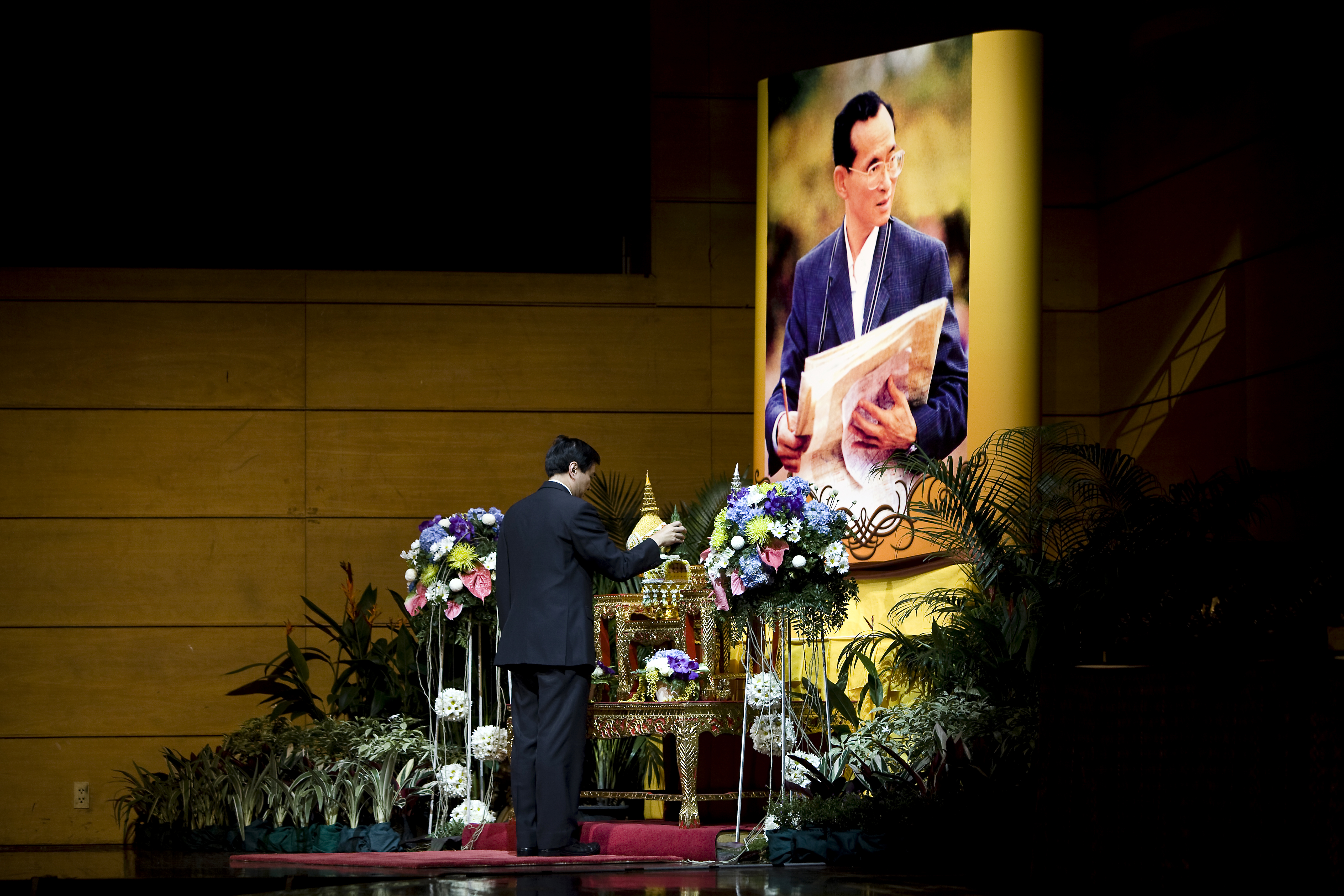 นรม.เป็นประธานในพิธีมอบรางวัลงานวันภาษาไทยแห่งชาติ ประจำปี2552 ณ หอประชุมใหญ่ ศูนย์วัฒนธรรมแห่งประเทศไทย 29กรกฎาคม2552 (The Official Site of The Prime Minister of Thailand Photo by พีรพัฒน์ วิมลรังครัตน์)